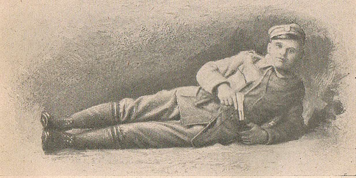 Jan Bielawski (1889-1915), żołnierz POW